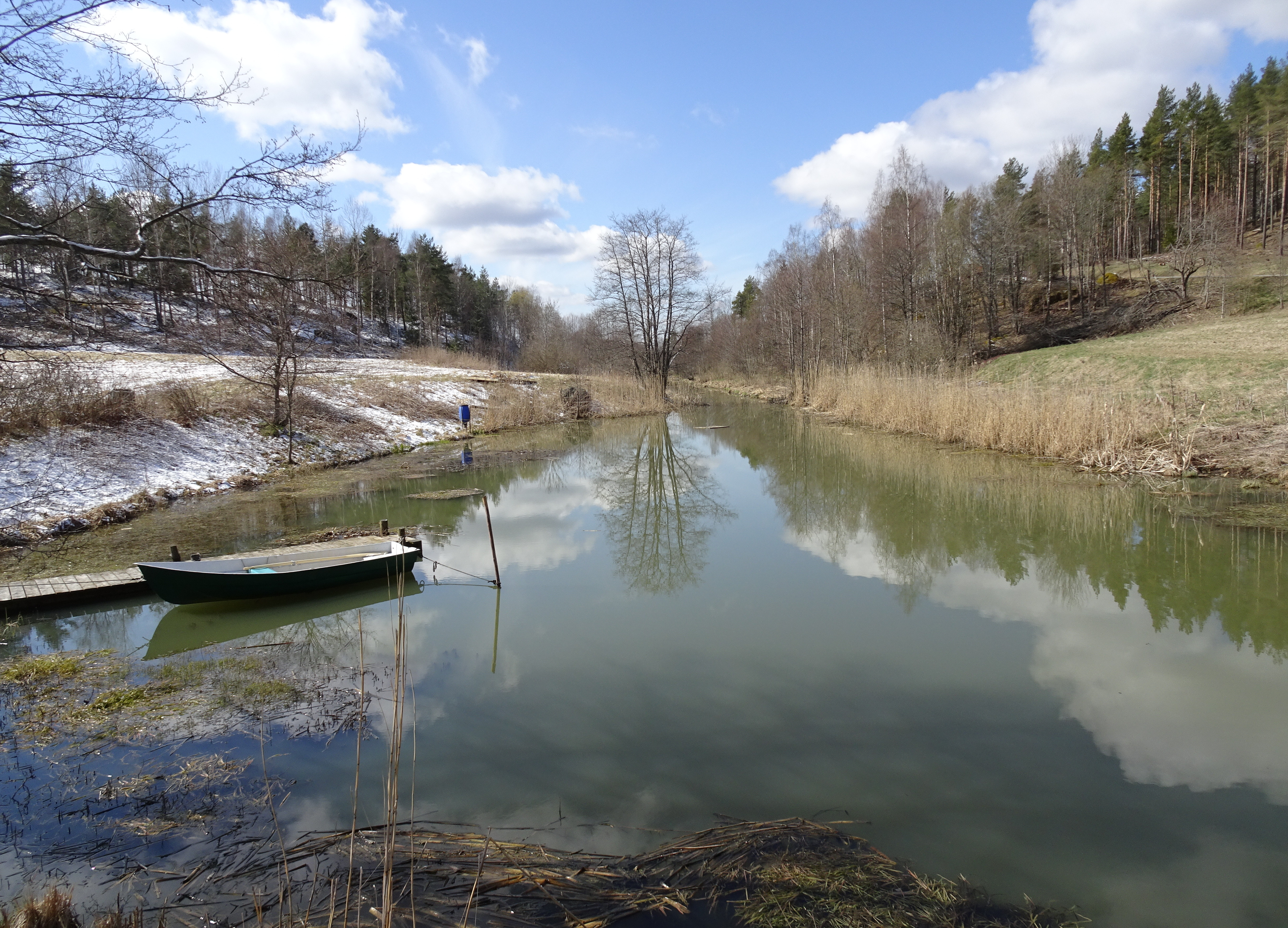 Åby kvarn, Kvarnsjön